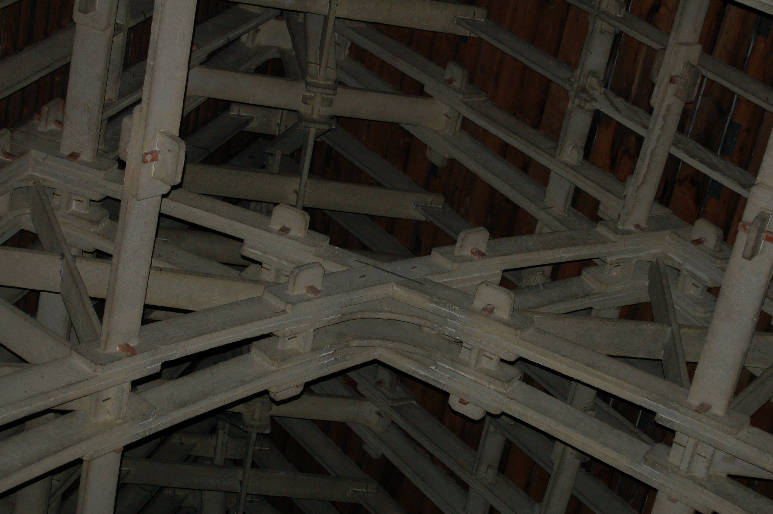 détails de la charpente de la nef (cathédrale Notre-Dame de Reims)